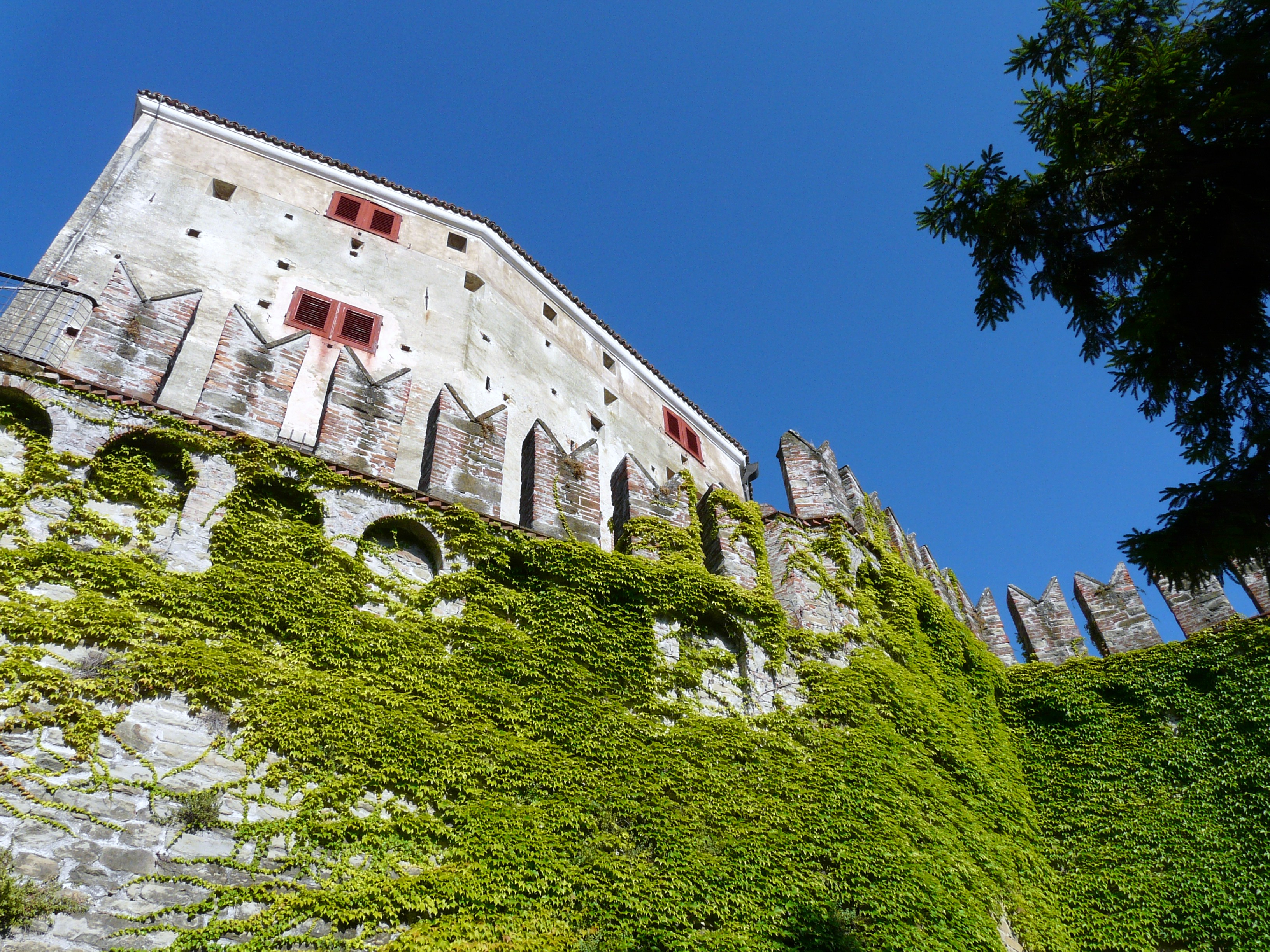 Complesso del castello di Cremolino, Piemonte, Italia